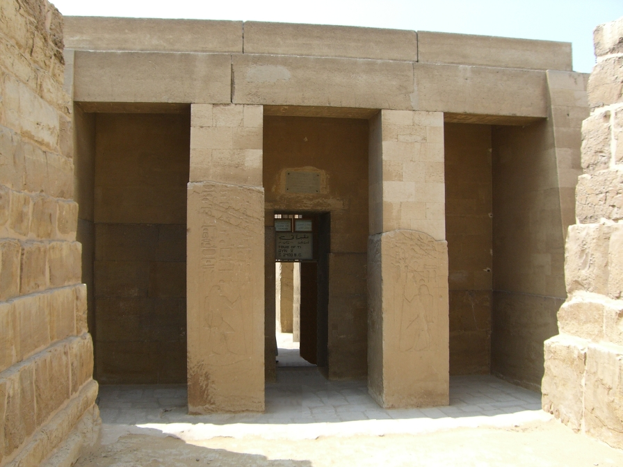 Portail d'entrée du mastaba de Ti à Saqqarah - Ve dynastie égyptienne